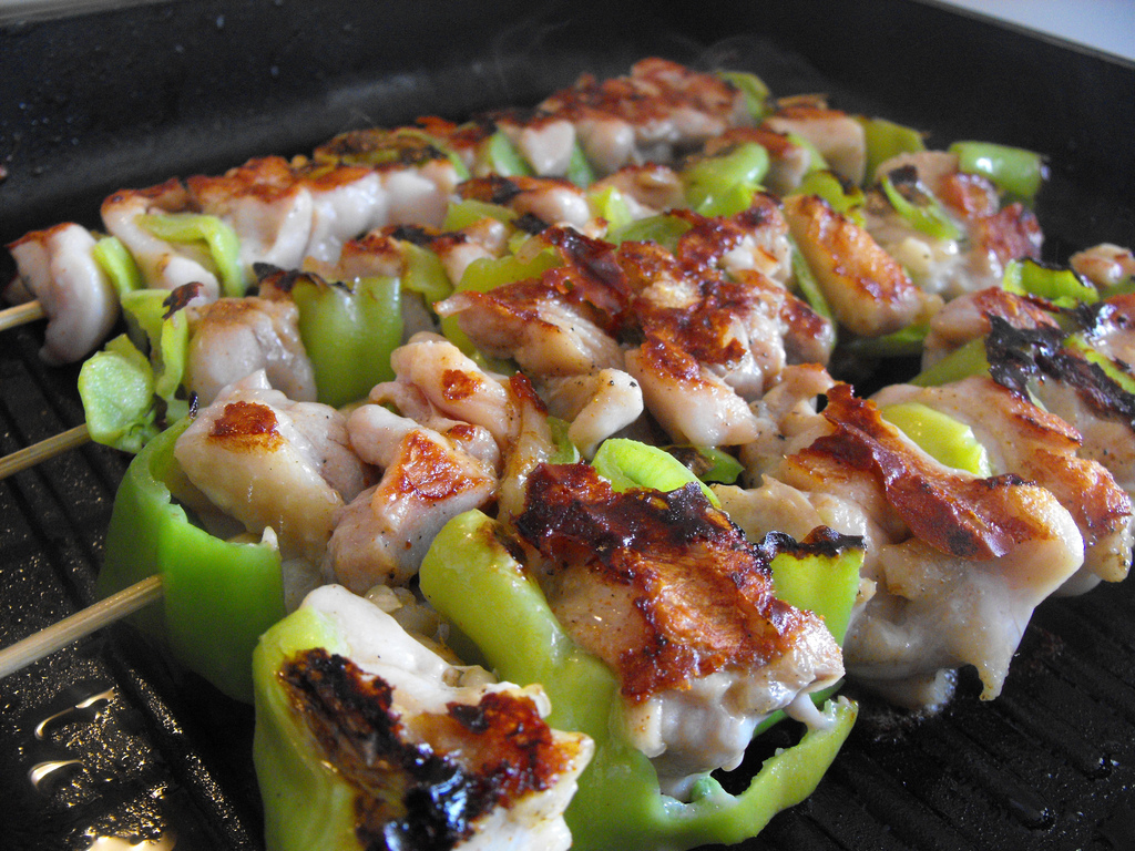 Tavuk shish